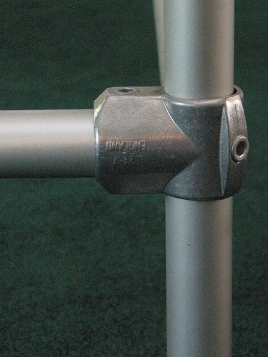 A basic Kee Klamp